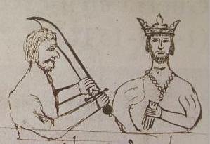 Representación del atentado cometido por Juan de Cañamares contra el rey Fernando II de Aragón el 7 de diciembre de 1492 en Barcelona. Dibujo extraido del Dietari de l'Antich Consell Barceloní, vol. III (detalle).